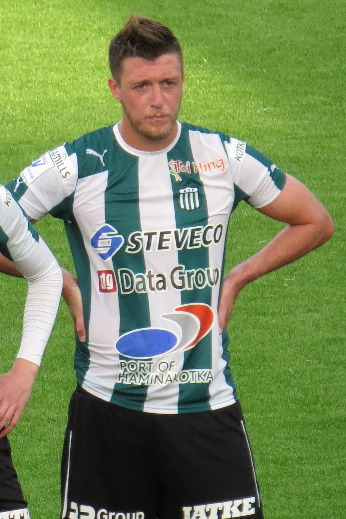 Shane McFaul, irlantilainen jalkapalloilija FC KTP:n paidassa kaudella 2015.